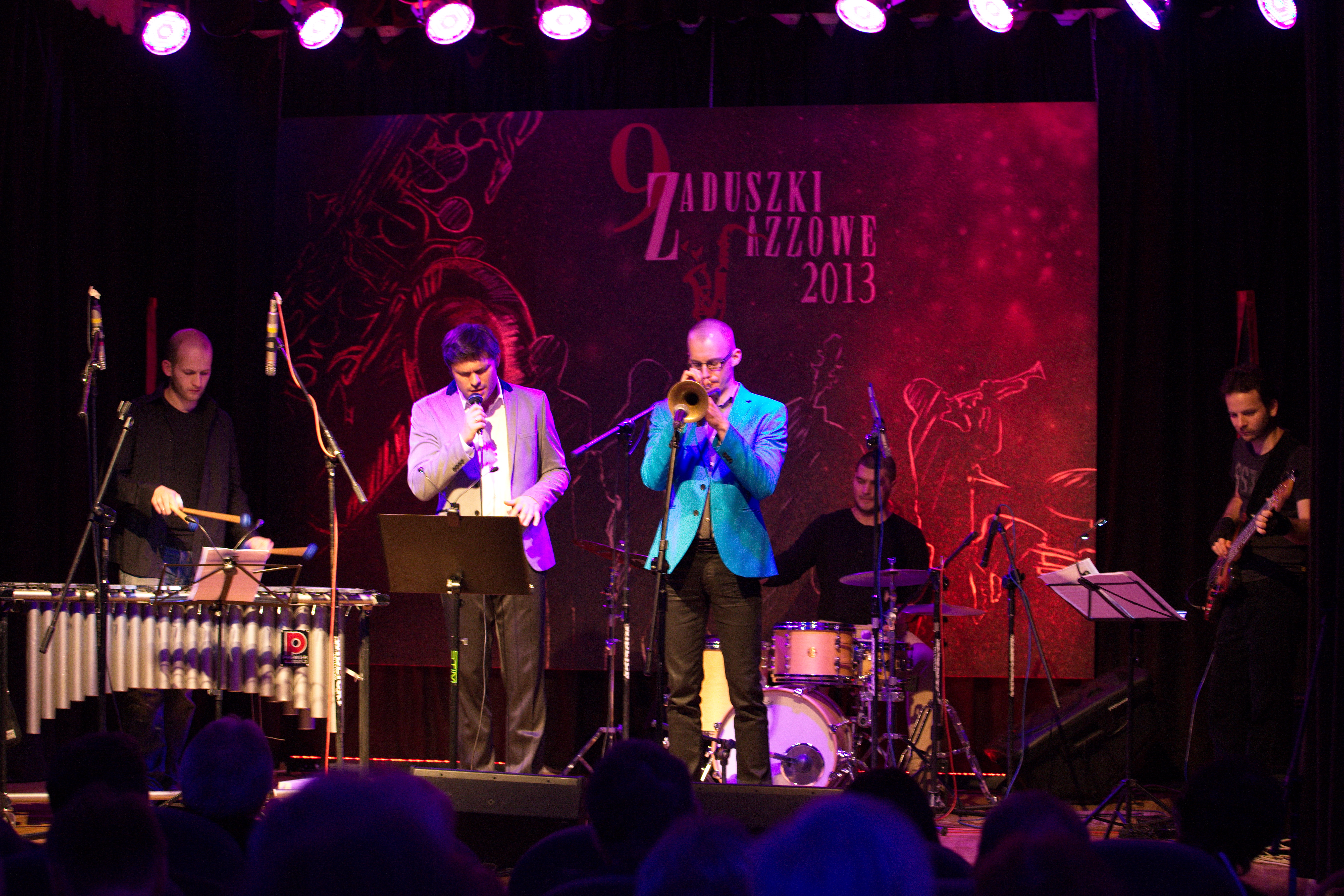 PIOTR SCHMIDT Group - Pińczów, 9. Zaduszki Jazzowe, 2 listopada 2013 r. Bartek Pieszka - wibrafon, Marcin Jajkiewicz - vocal, Piotr Schmidt - trąbka, Sebastian Kuchczyński – perkusja, Michał Barański - gitara basowa.